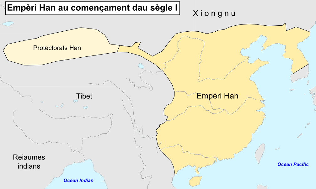 Empèri Han au començament dau sègle I.